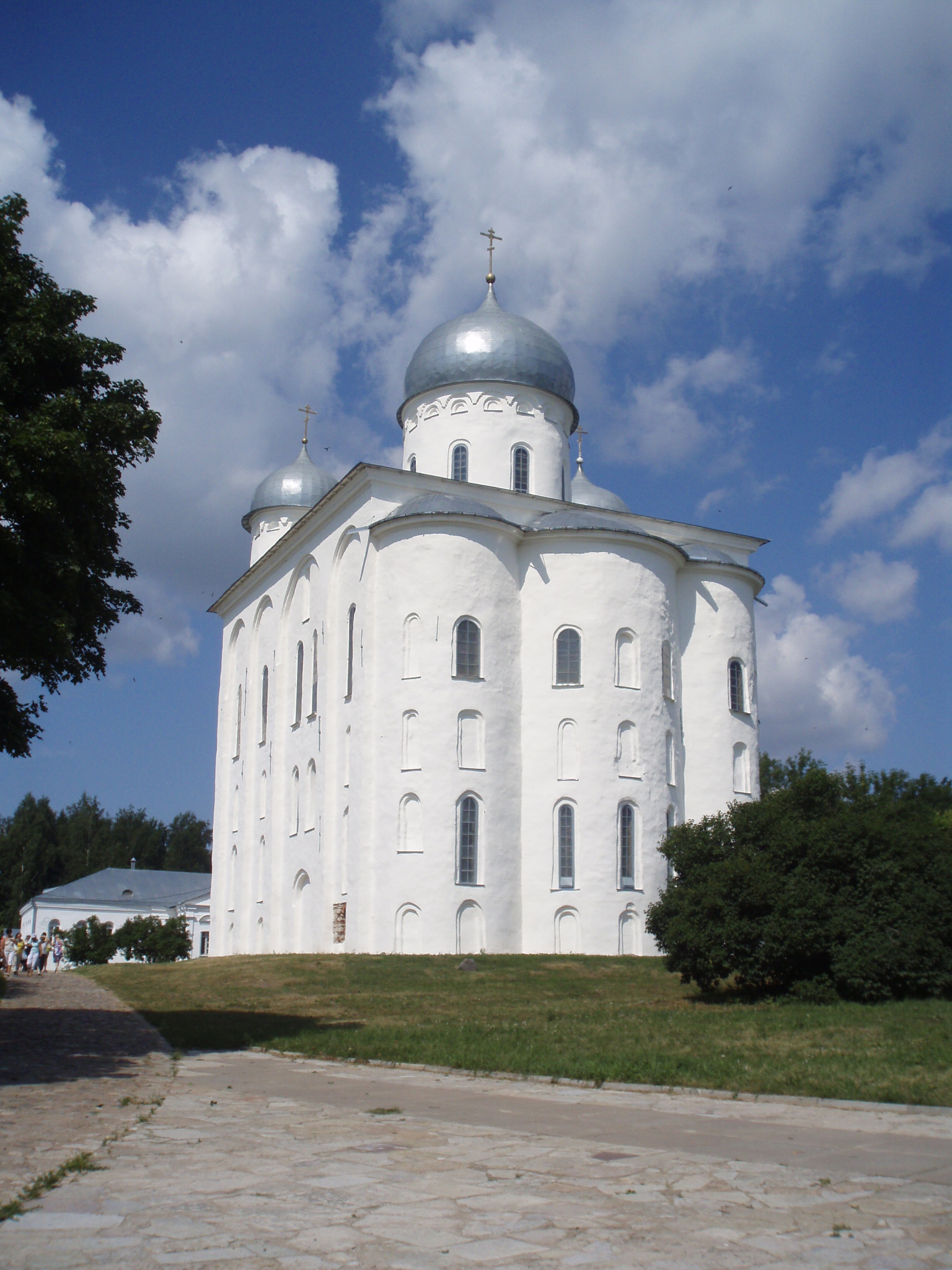 Монастырь Юрьев (Новгородская область, Великий Новгород, д. Юрьево)